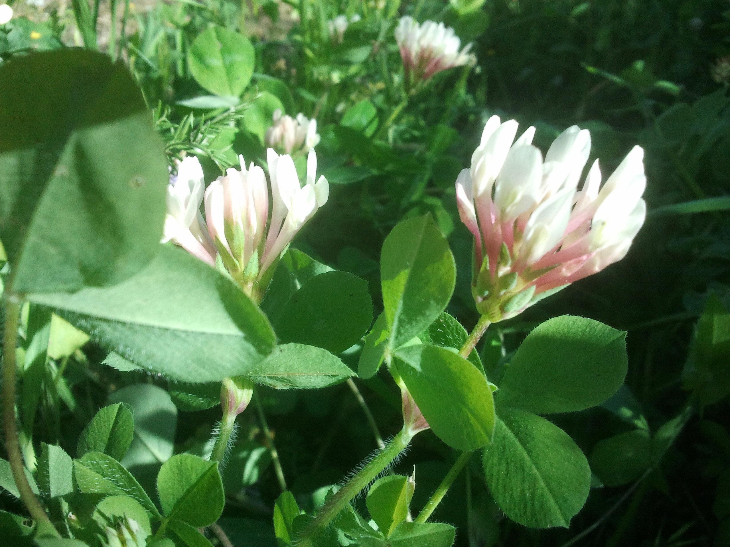 תלתן תריסני, צמח בר מסוג תלתן מתת משפחת הפרפרניים נפוץ מאד בארץ ישרל